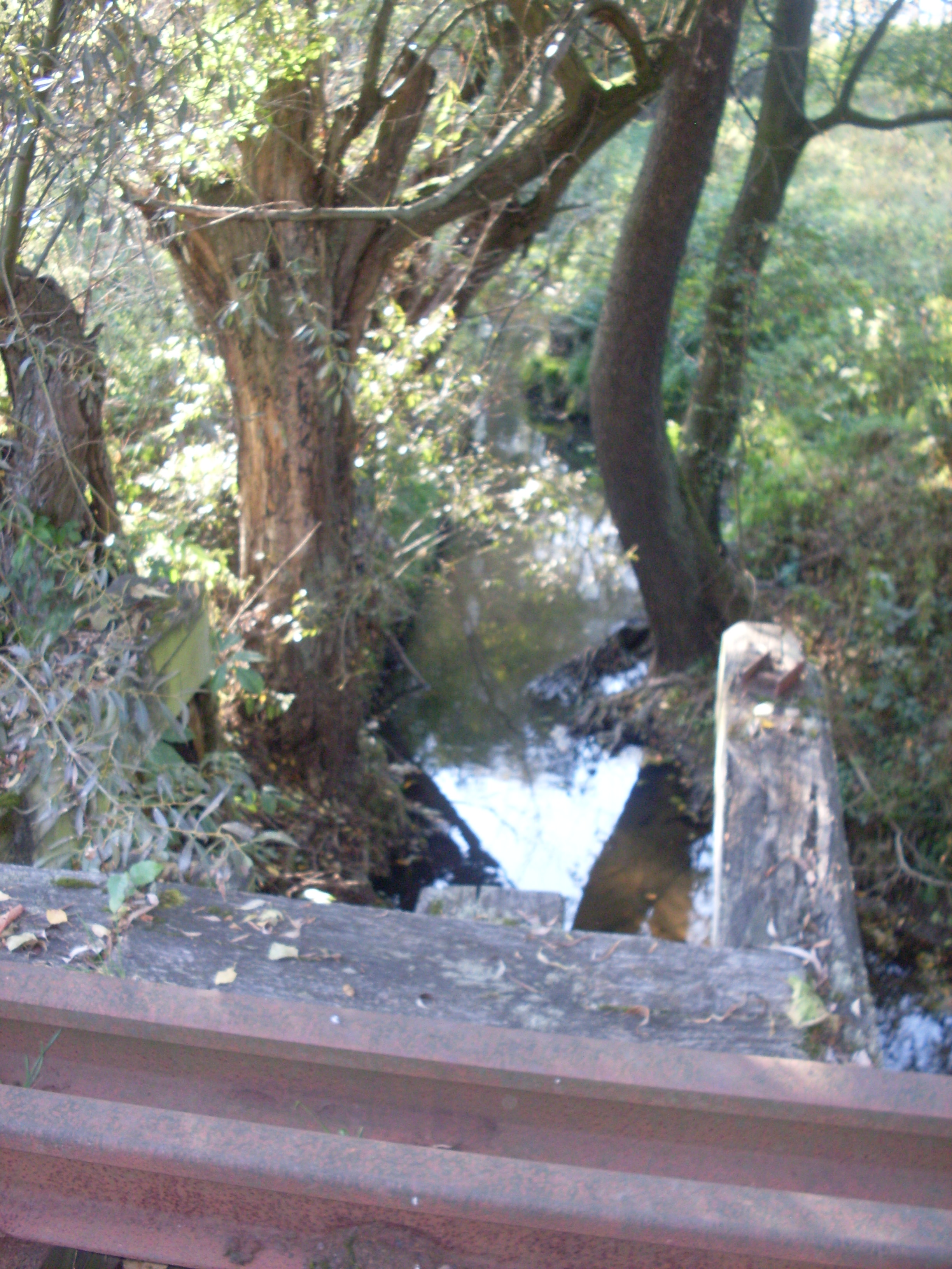 Rzeka Dulówka w Tenczynkach-Piaskach, koło nieczynnego mostu kolejowego.